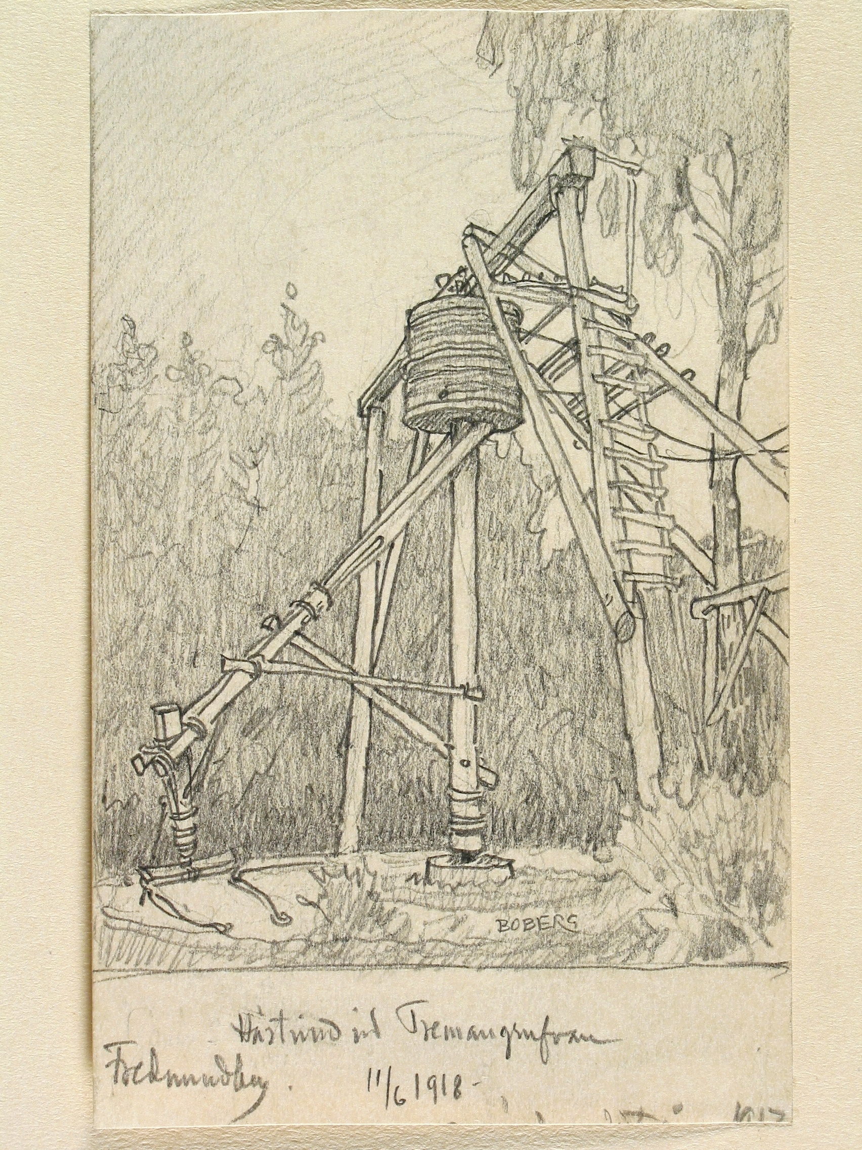 Dalarna, Ludvika sn., Fredmundsberg. "Hästvind vid Tremangruvan". Teckning av Ferdinand Boberg Depicted place: Tremangruvan (Ort), Ludvika sn., Fredmundsberg (Ortnamn därutöver), Dalarna County (Q103732)